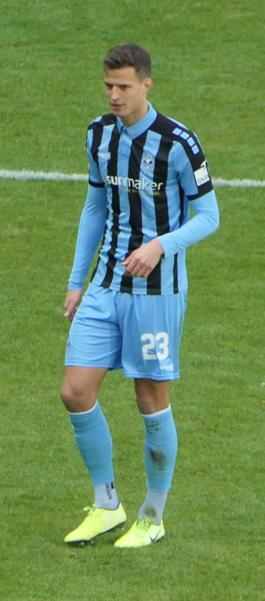 Der Fussballprofi Michael Schultz im Trikot vom SV Waldhof Mannheim beim Heimspiel gegen Eintracht Braunschweig am 08.12.2019.